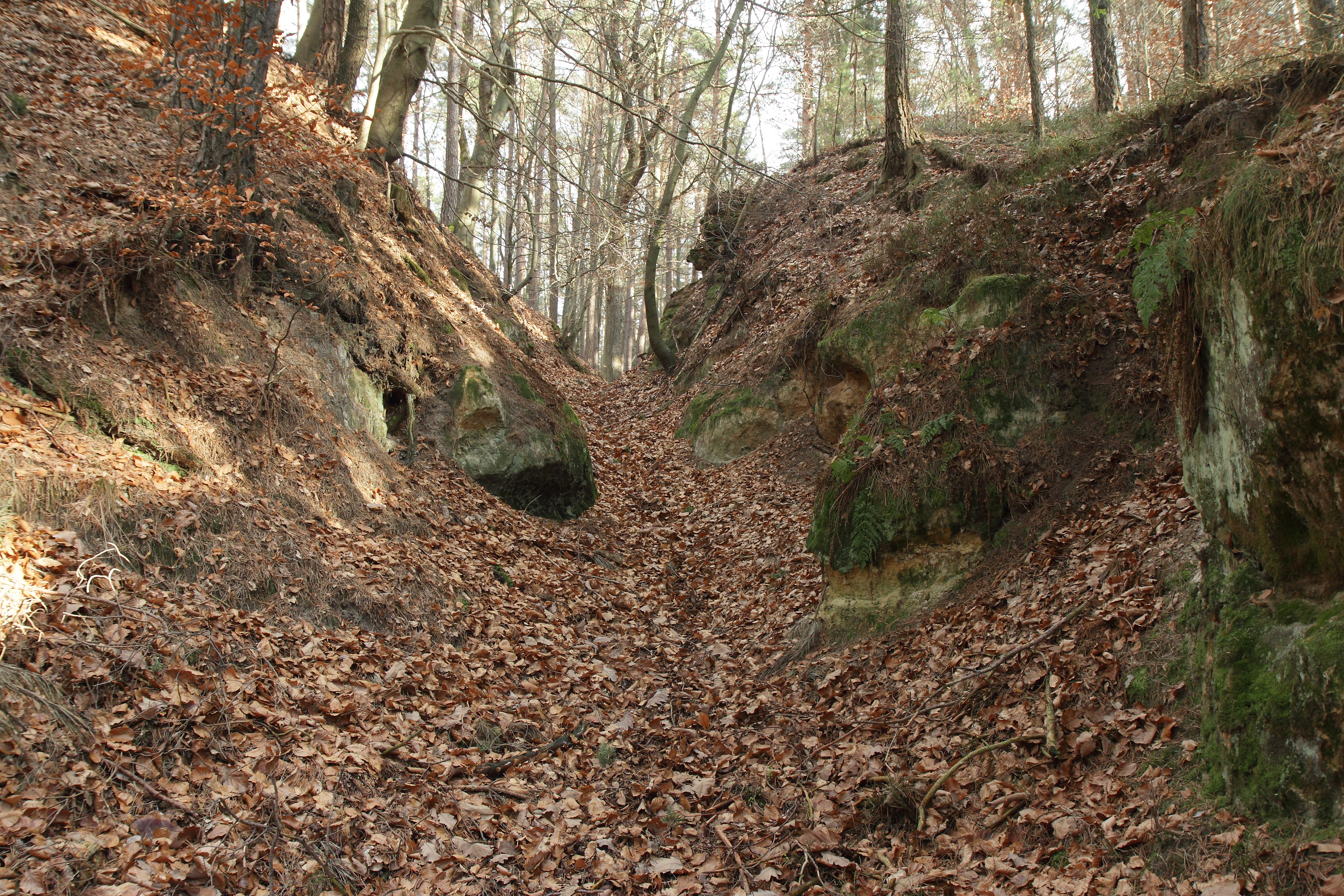 Burgstall Wappersdorf - Südlicher Graben, Blick nach Osten